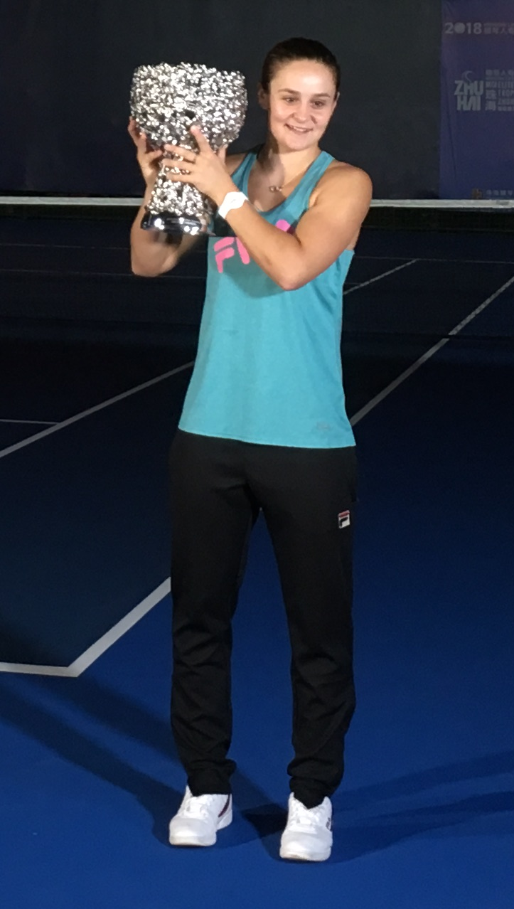 中文（中国大陆）: 2018珠海WTA超级精英赛女单冠军阿什利·巴蒂